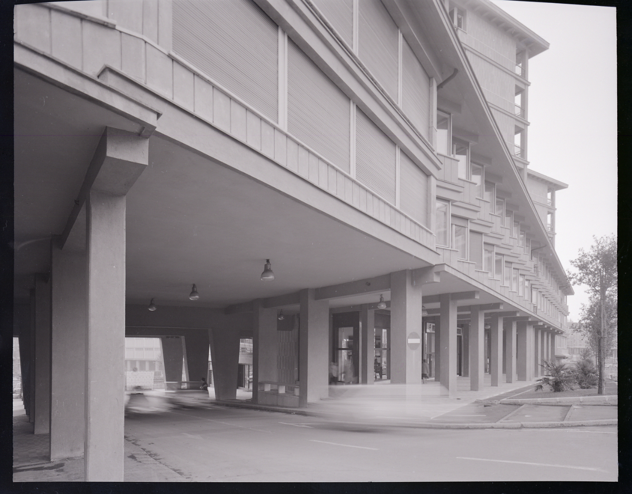 Genova. Quartiere Piccapietra progettato dagli architetti Franco Albini e Franca Helg. Servizio fotografico : Genova, 1964 / Paolo Monti. - Buste: 7, Fototipi: 7 : Negativo b/n, gelatina bromuro d'argento/ pellicola ; 10x12. - ((Serie costituita da 7 buste contenenti 7 negativi identificati con i nn.: 10242-10248. La suddetta serie è contenuta nella scatola identificata con la numerazione 9001-10500G. - Occasione: Documentazione fotografica della realizzazione del piano regolatore del quartiere Piccapietra. - Fonte: Rubrica di Paolo Monti: Archivio 10x12 (ultimi numerati) - dal G1 al (s.d.), presso Archivio Paolo Monti